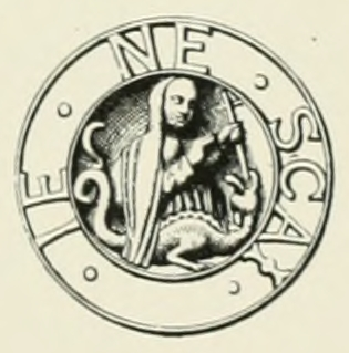 Porträtbüste Philibert II. von Savoyen, Conrat Meit, ca. 1515 bis 1520, Buchsbaumholz, 11,6 cm hoch, British Museum, Detail des Medaillons am Barett